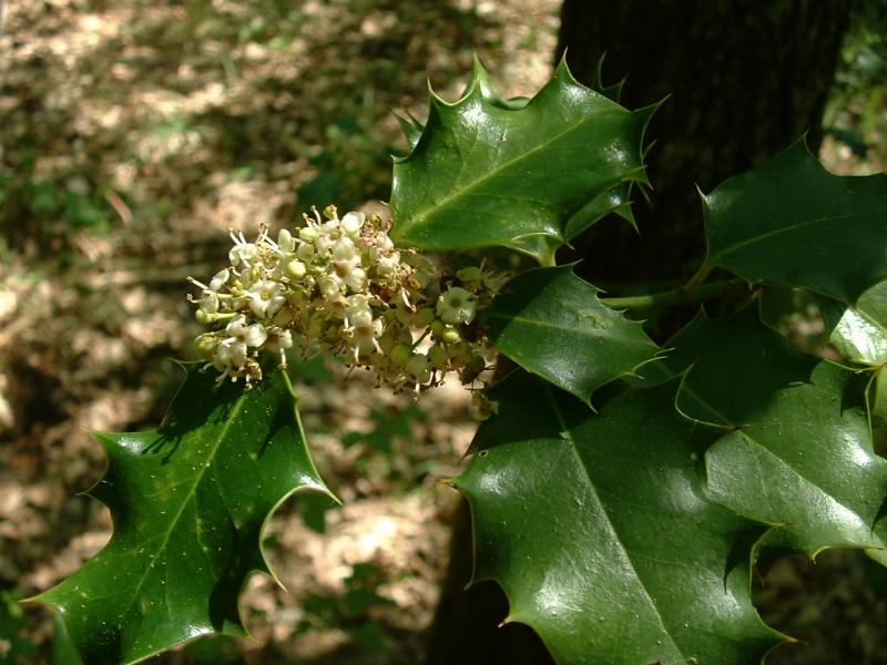 houx à floraison, photo J.F. Gaffard, Bucey-lès-Gy, mai 2004